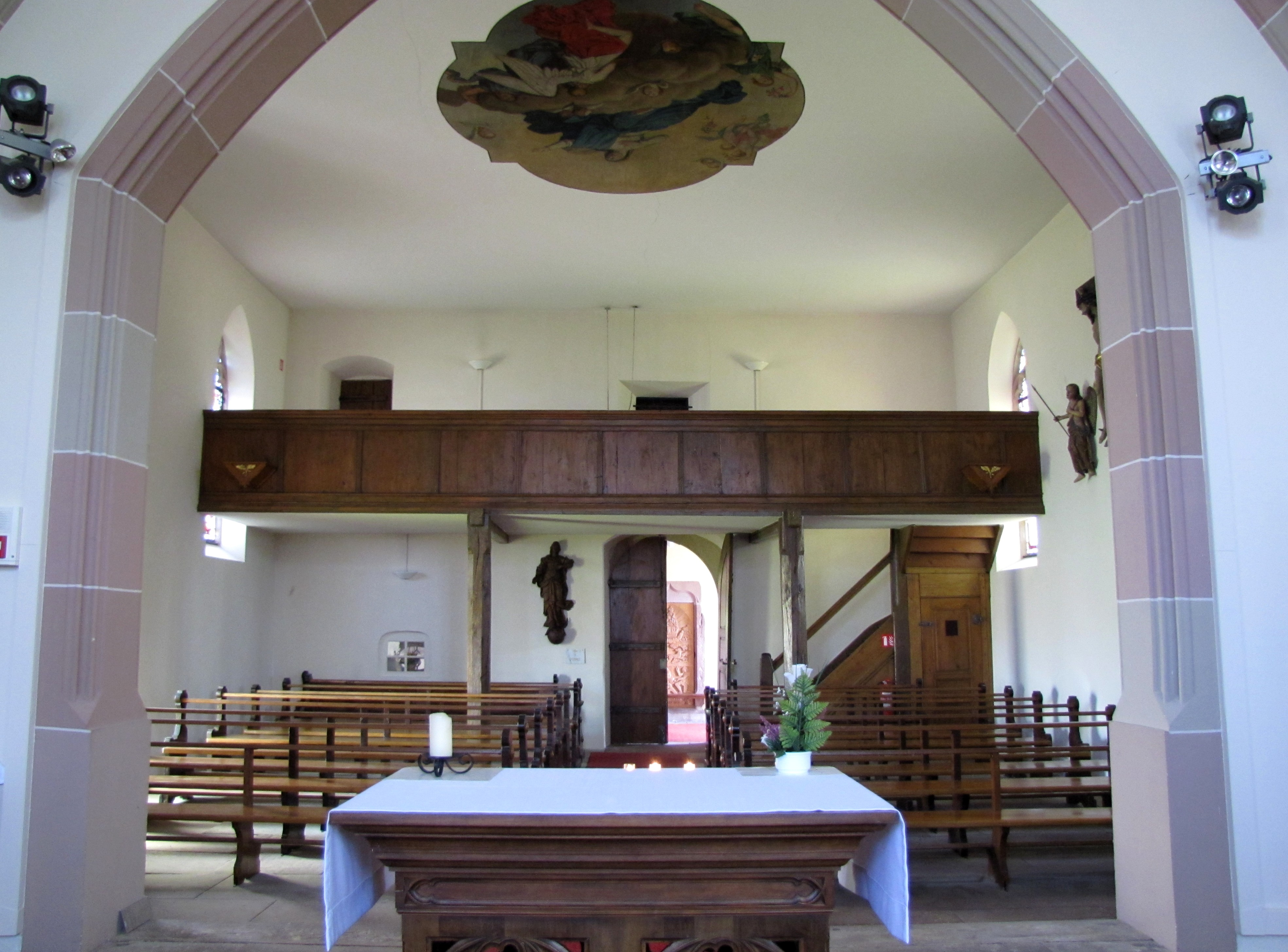 Alsace, Bas-Rhin, Plobsheim, Chapelle Notre-Dame du Chêne, Appartement du Waldbruder (1812): (PA00084895, IA00023121): Vue intérieure vers la tribune.